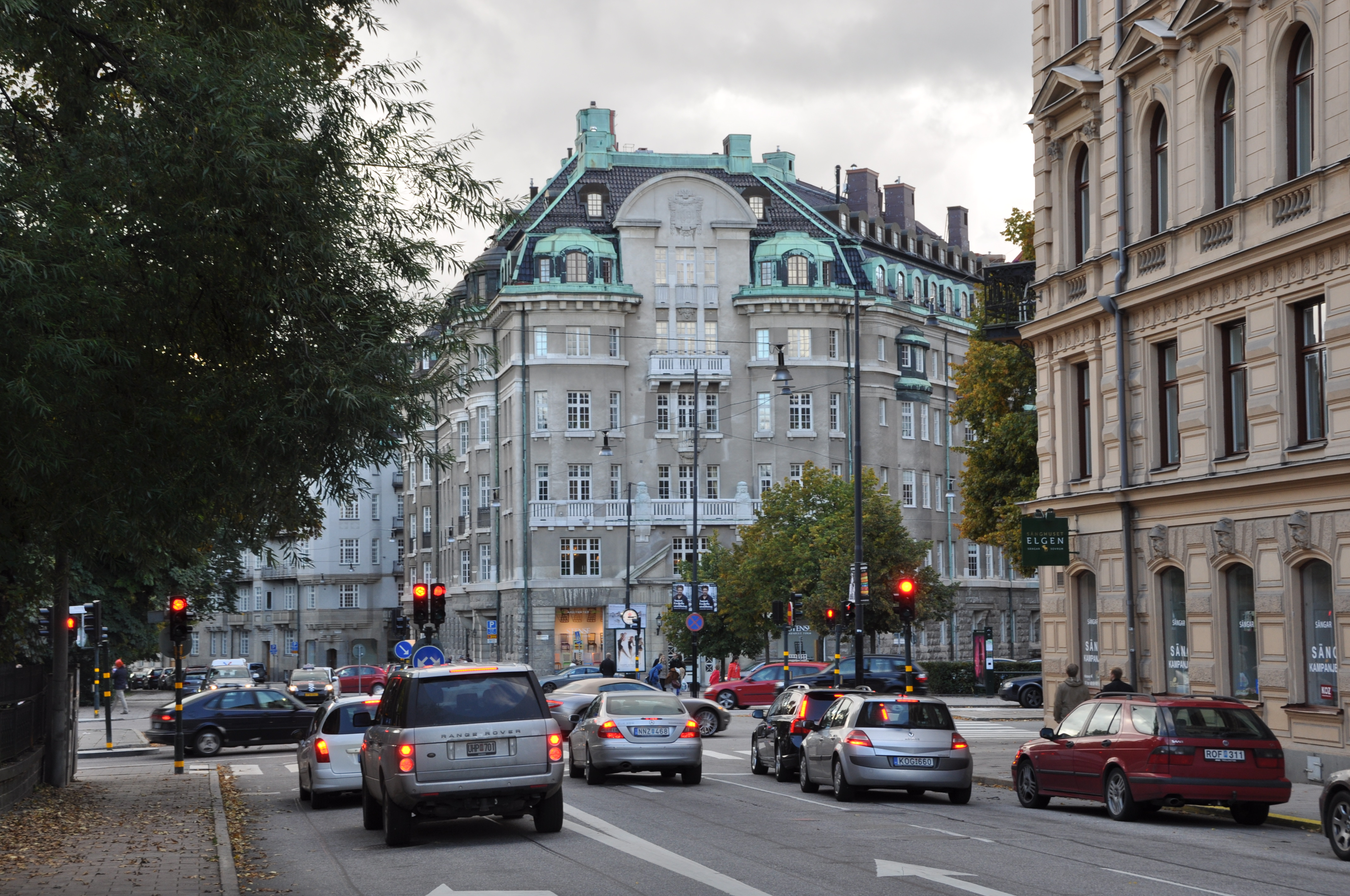 Runebergsplan, vid korsningen Engelberktsgatan och Karlavägen